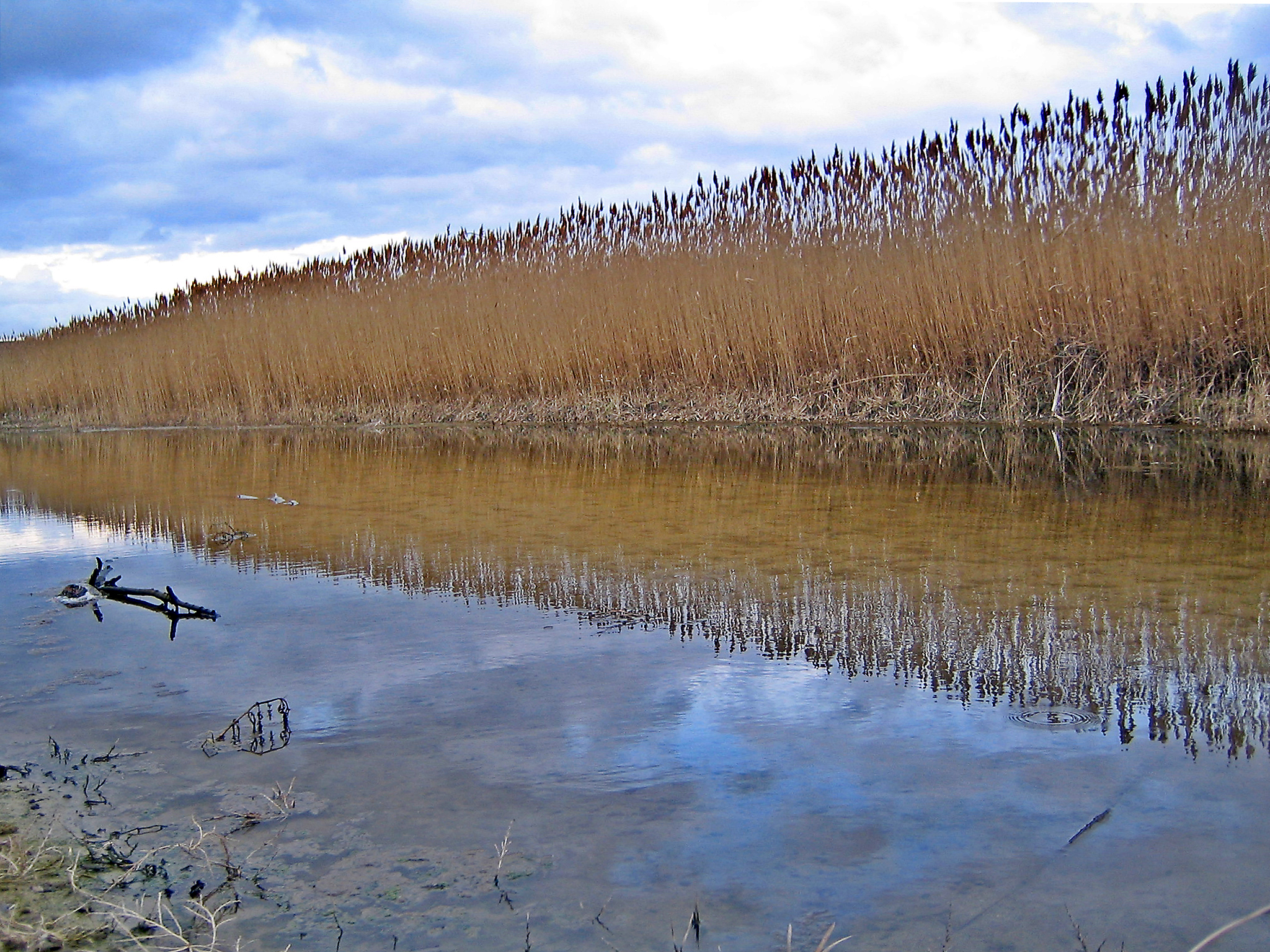 Represamiento de Foncastin (Pedanía de Rueda, provincia de Valladolid), está en el río Zapardiel (afluente del duero).